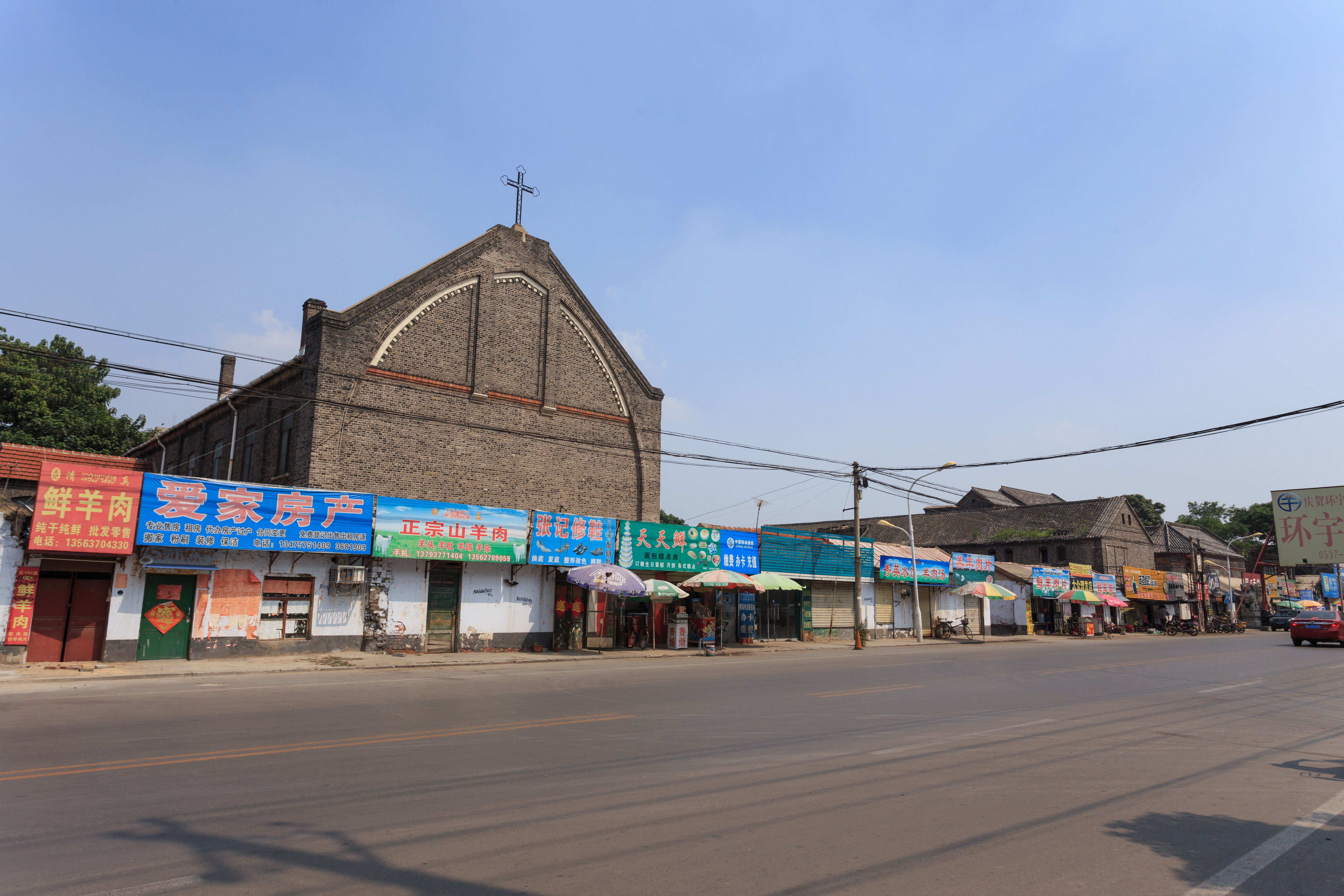 兖州天主教堂